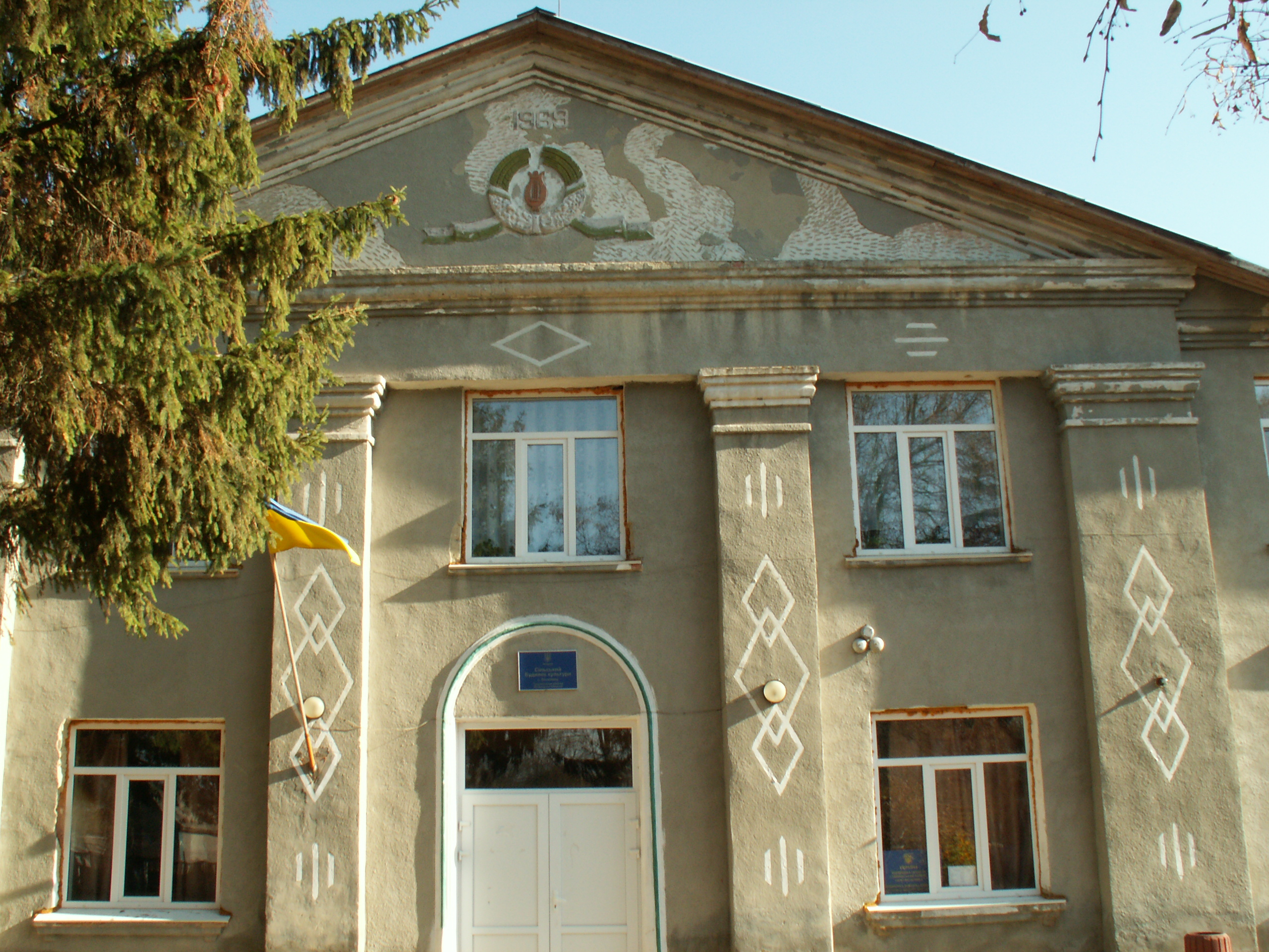 Фасад клубу